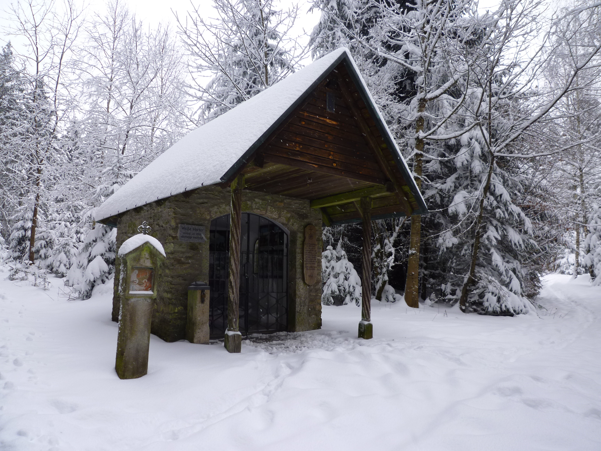 Ehemalige Wallfahrtskapelle "Weiße Marter" mit Ausstattung im Gemeindebereich von St. Englmar.